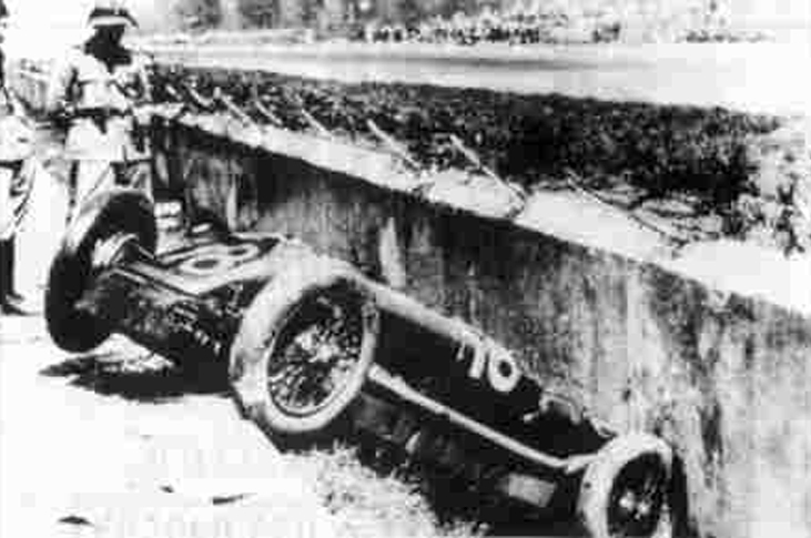 La Talbot di Emilio Materassi ripresa dopo l'incidente mortale al circuito di Monza del 9 settembre 1928